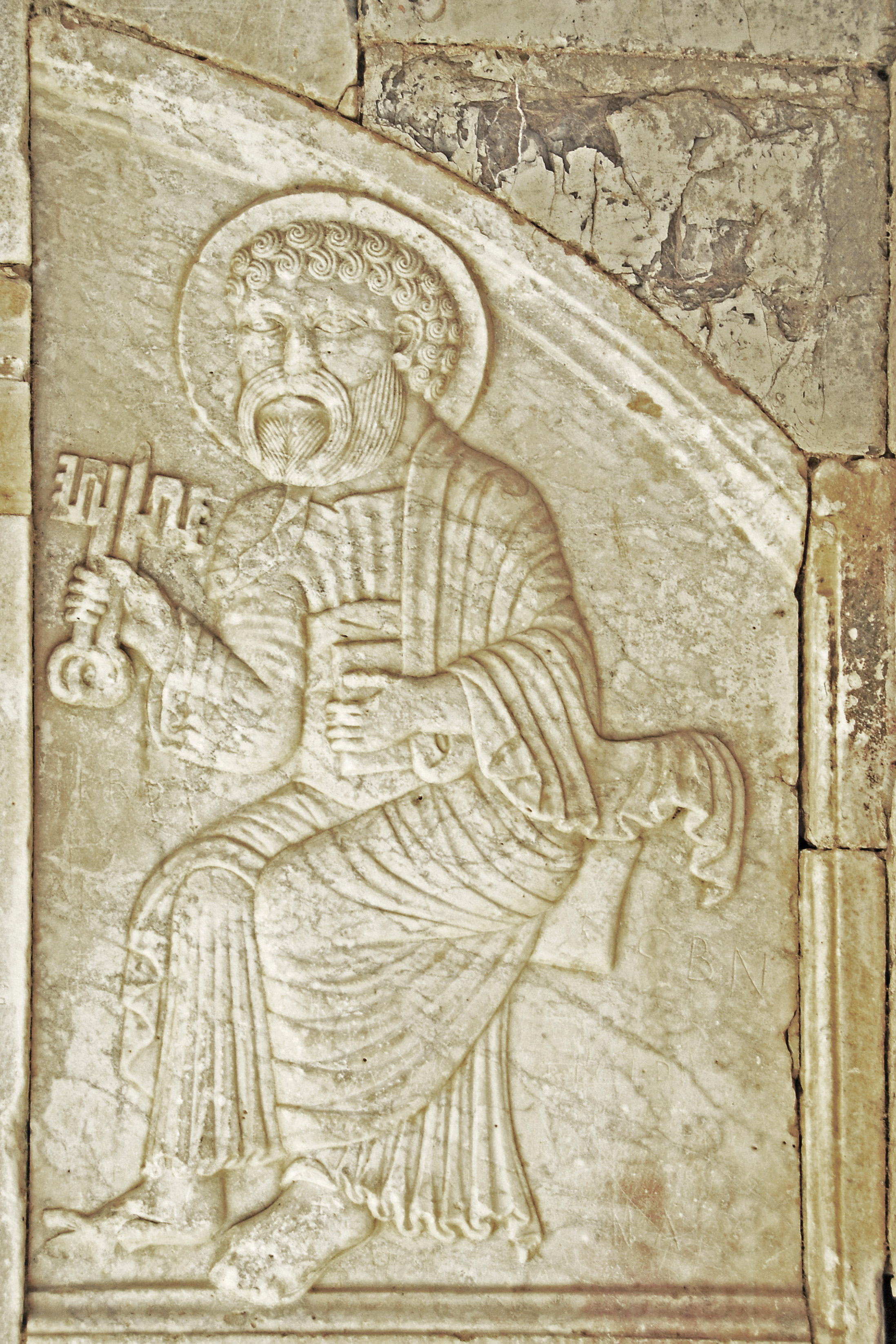 St-Pierre-et-St-Paul de Maguelone, Hauptportal, Flachrelief Petrus